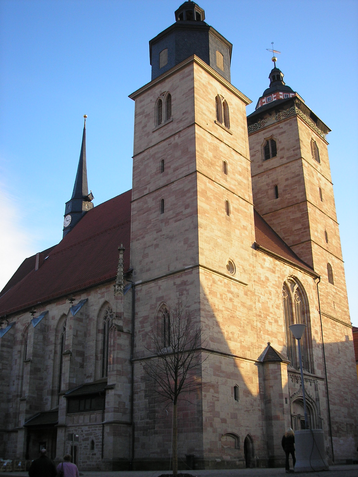 Die Stadtkirche St. Georg in Schmalkalden (Thüringen).